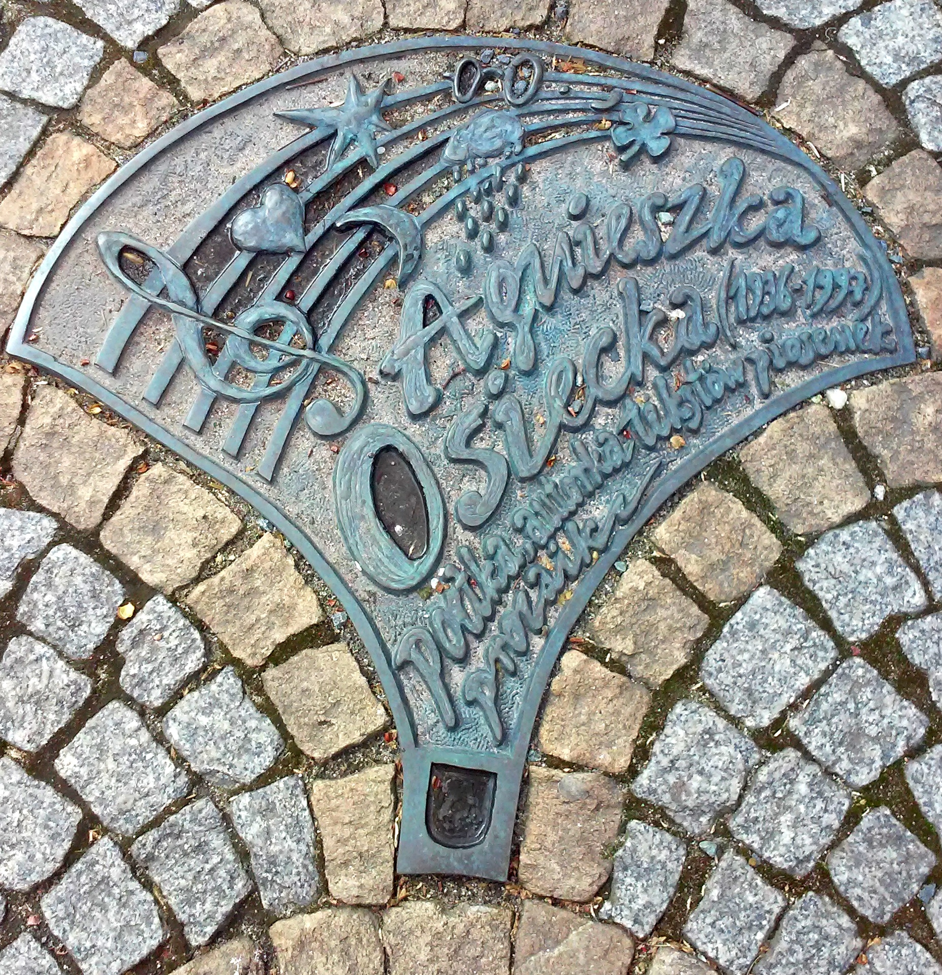 Legnica, Aleja Gwiazd Satyrykonu, tablica pamiątkowa - Agnieszka Osiecka